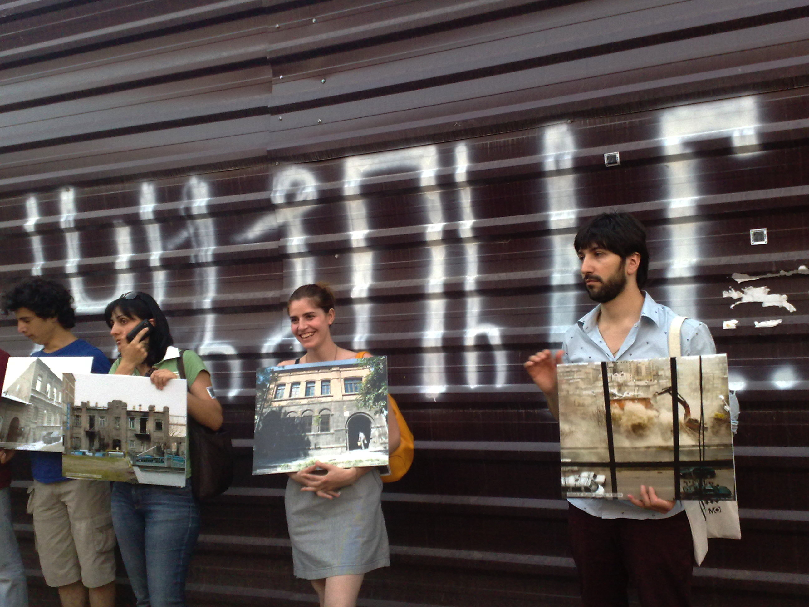 Ցուցարարներ փակ շուկայի առջև, 14 մայիս 2012 թ․ 6/152